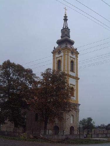 Serbian Orthodox Church in Bačinci, Serbia, Vojvodina/L'église orthodoxe serbe de Bačinci, Serbie, Voïvodine